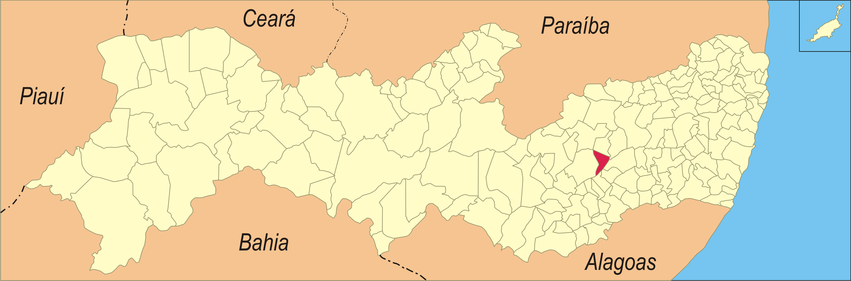 Localização da cidade em Pernambuco